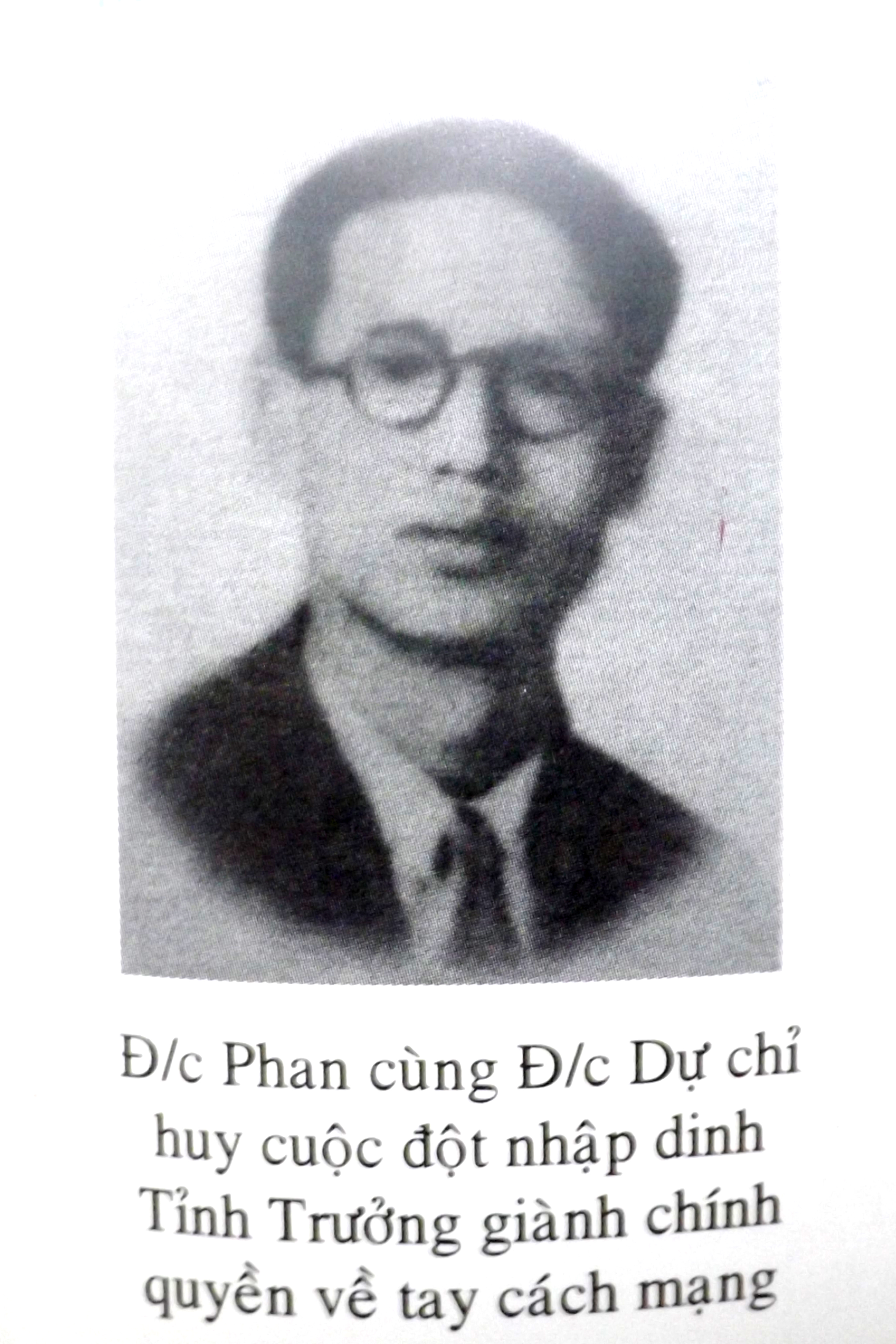 Nhà yêu nước Ninh Văn Phan 1908-1980